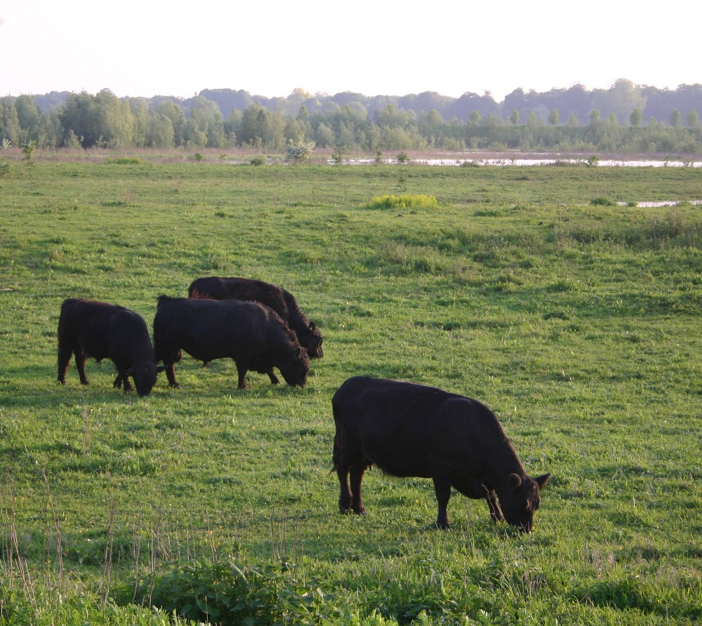 Eigen foto van begrazing van de uiterwaarden door koeien